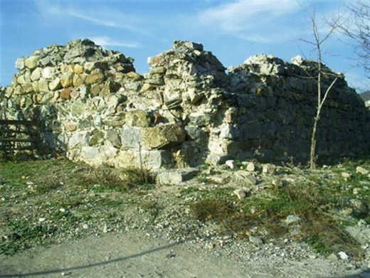 Bahçe, Osmaniye'den bir görünüm.